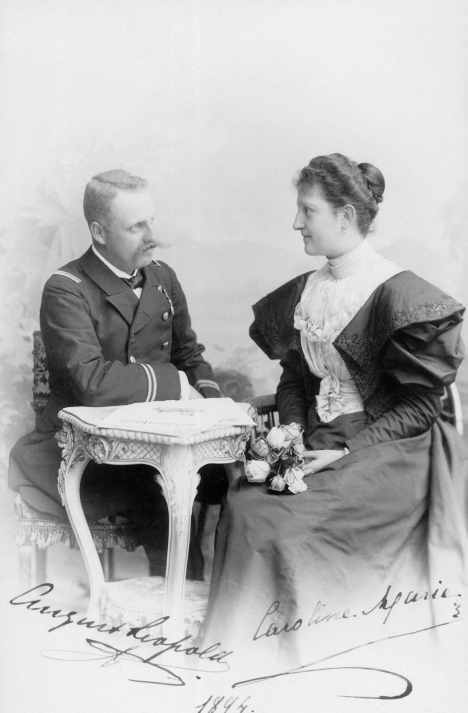 August Leopold, Prinz von Sachsen-Coburg-Gotha zusammen mit seiner Braut Karoline Maria Immakulata, Erzherzogin von Österreich-Toskana.